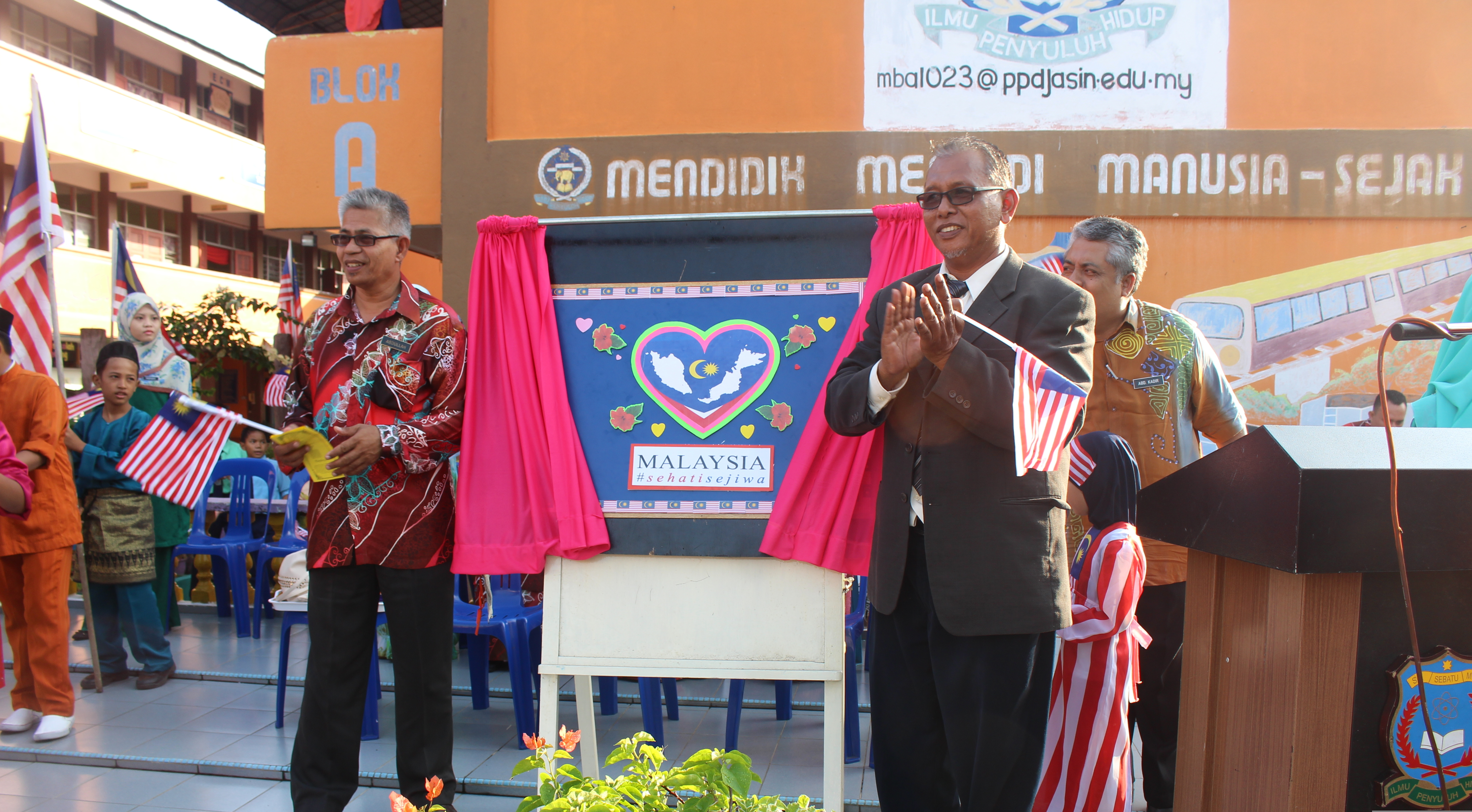 Selesai Sudah Perasmian Sambutan Bulan Kemerdekaan 2017